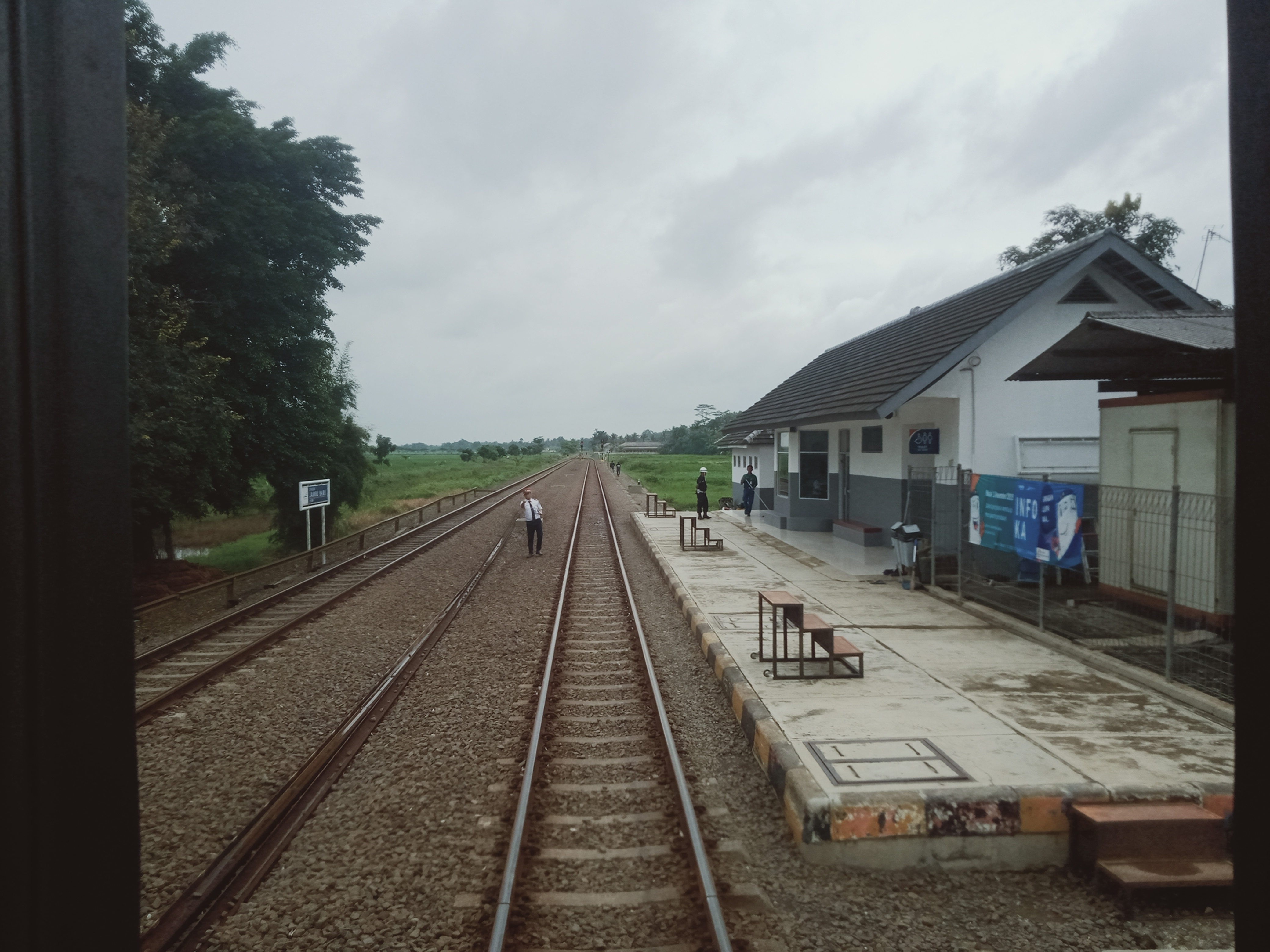 Bangunan utama Stasiun Jambu Baru, 2020